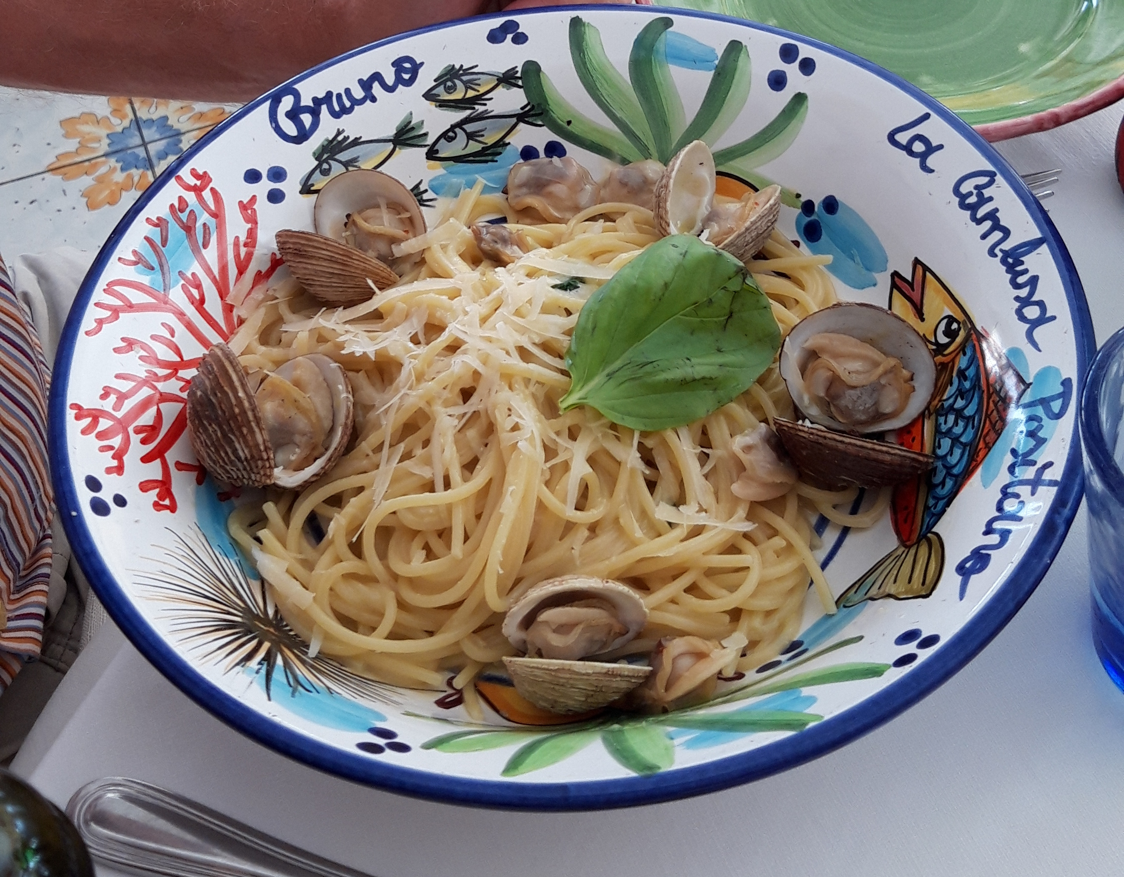 tartufo di mare. wrattige venusschelp met spaghetti